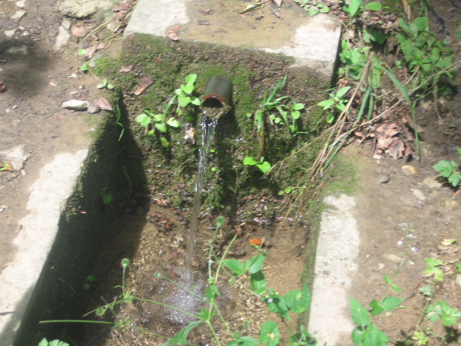 A Lillafüred közelében lévő pisztrángtelep feletti forrás, Hárs kút.